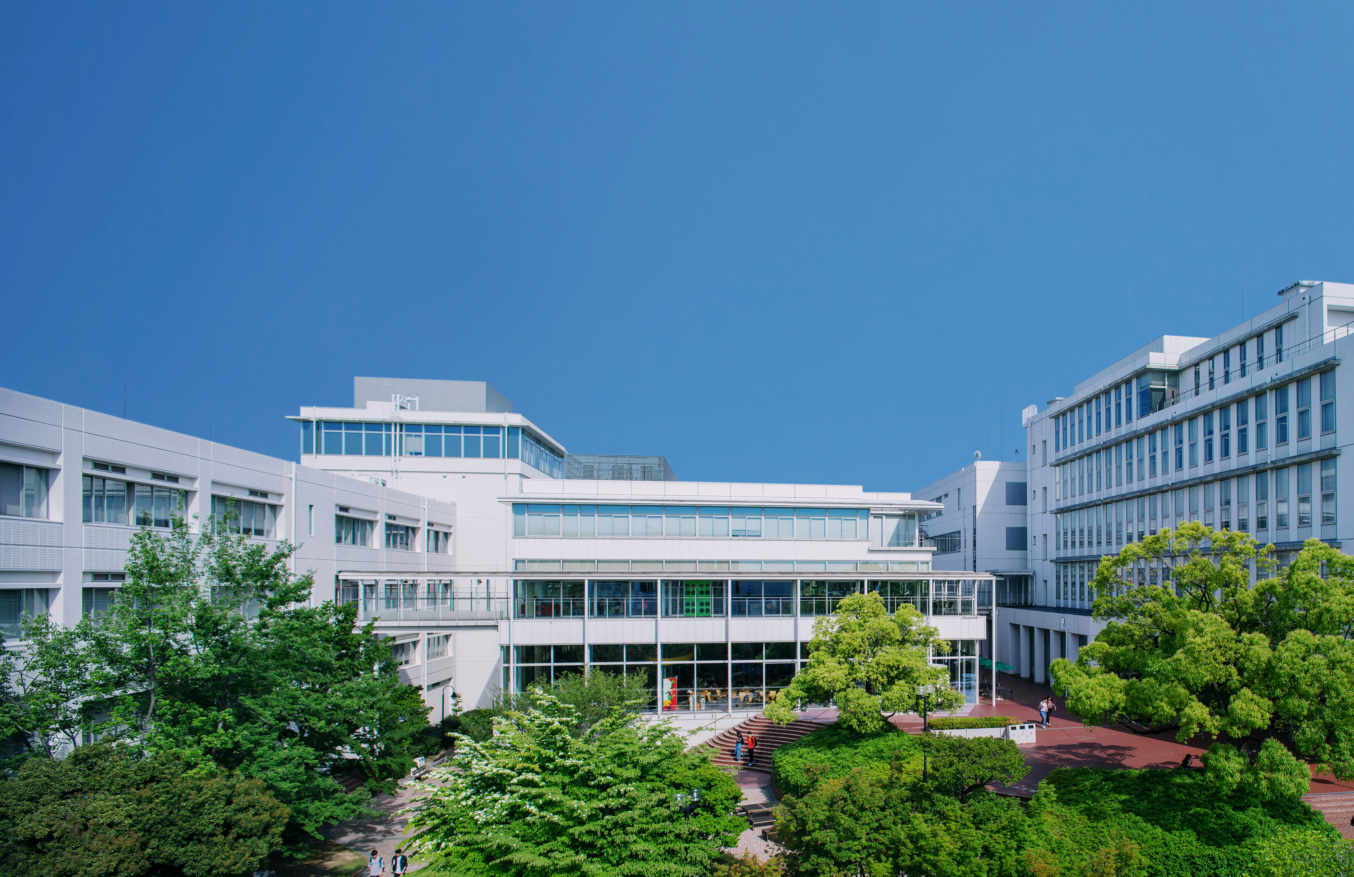 名古屋外国語大学写真